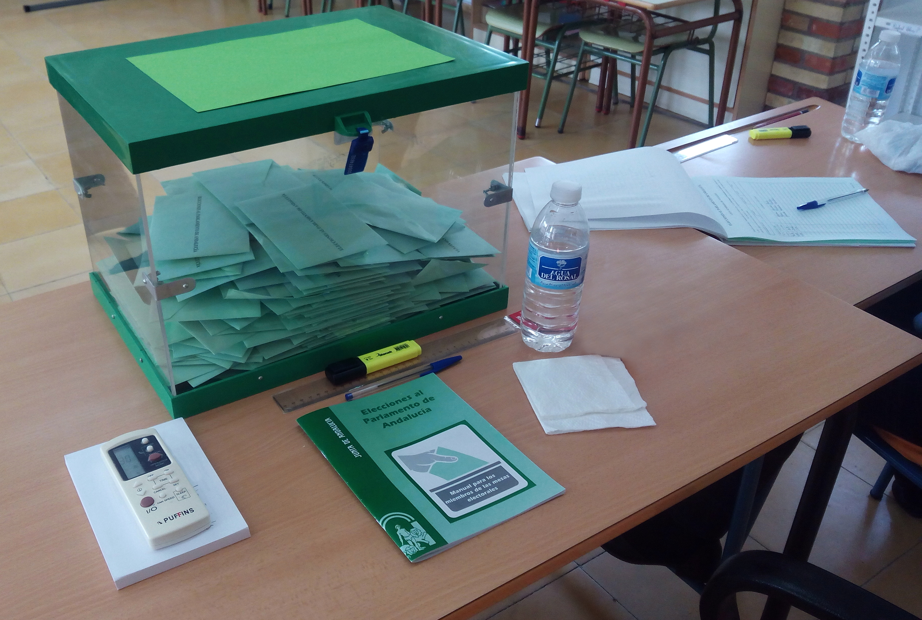 Urna electoral de las Elecciones al Parlamento de Andalucía en Montalbán de Córdoba.